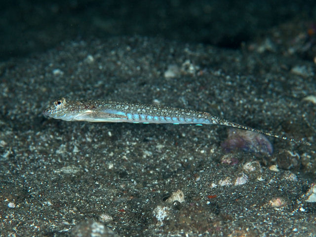 イズヌメリ Calliurichthys izuensis